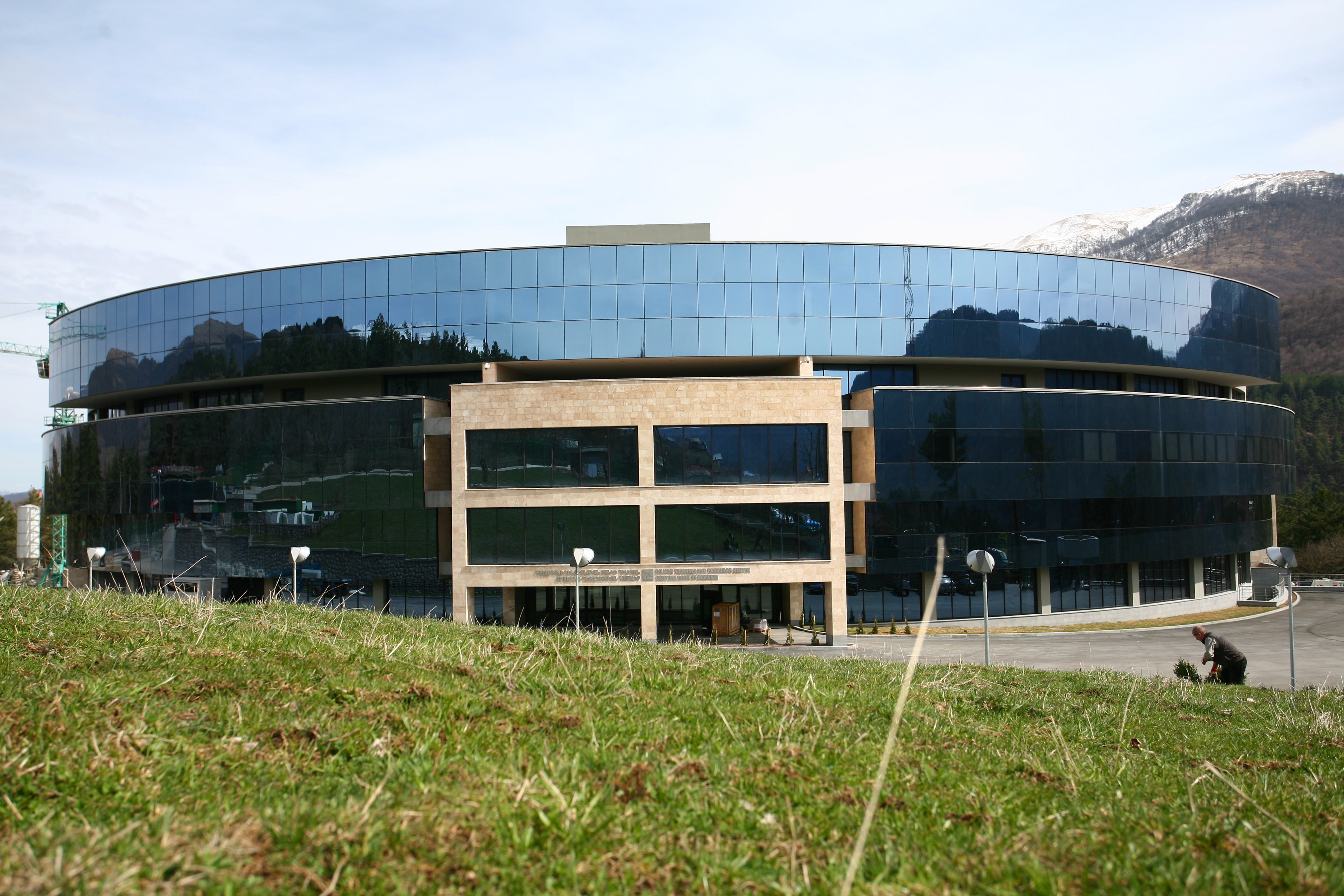 Դիլիջան Ուսումնահետազոտական Կենտրոն